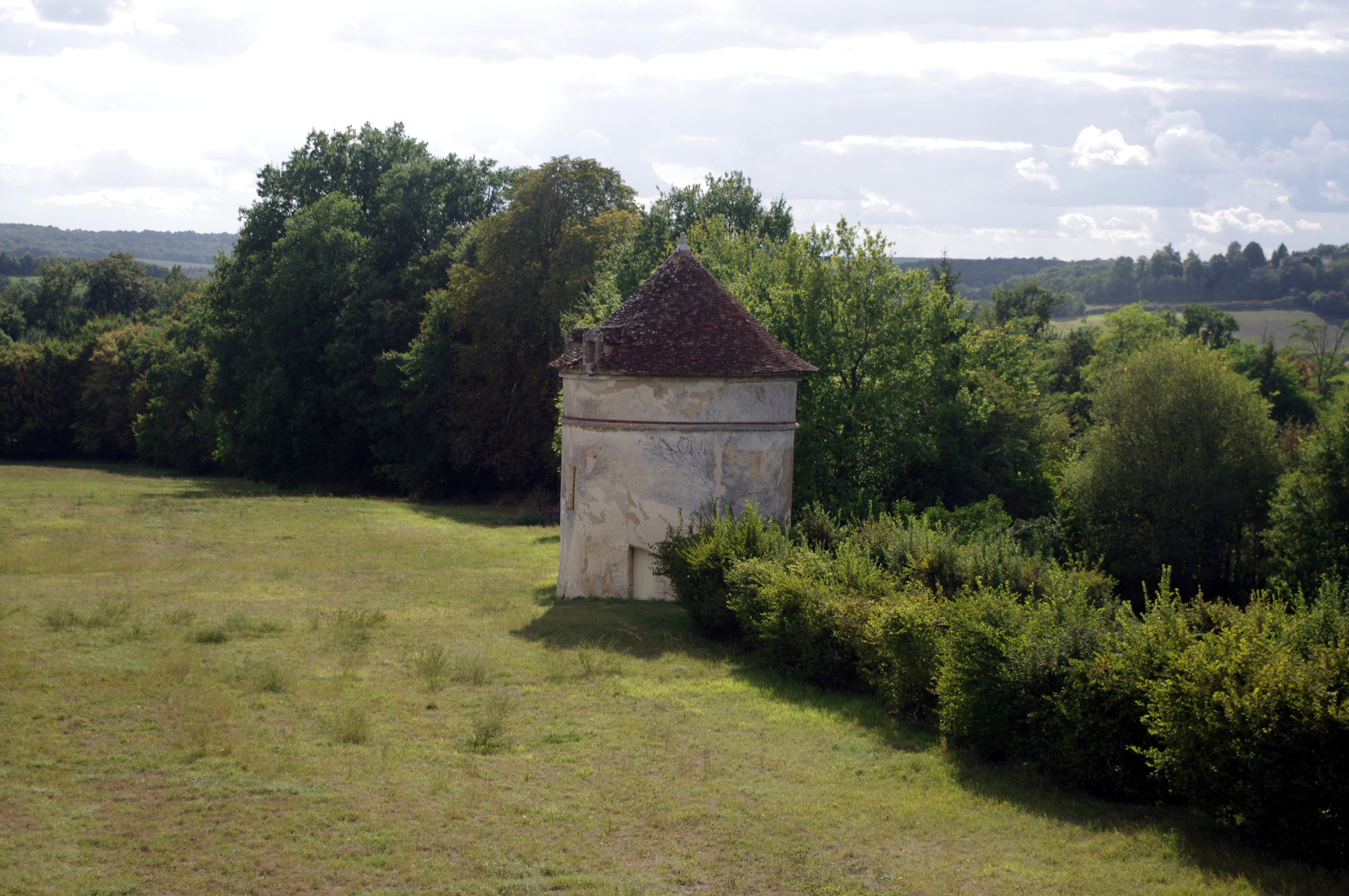 Le pigeonnier du château de Connezac à contre-jour, Dordogne, France. .